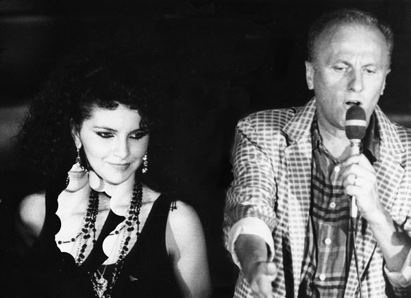 Foto con Sahara e Maurizio Seymandi